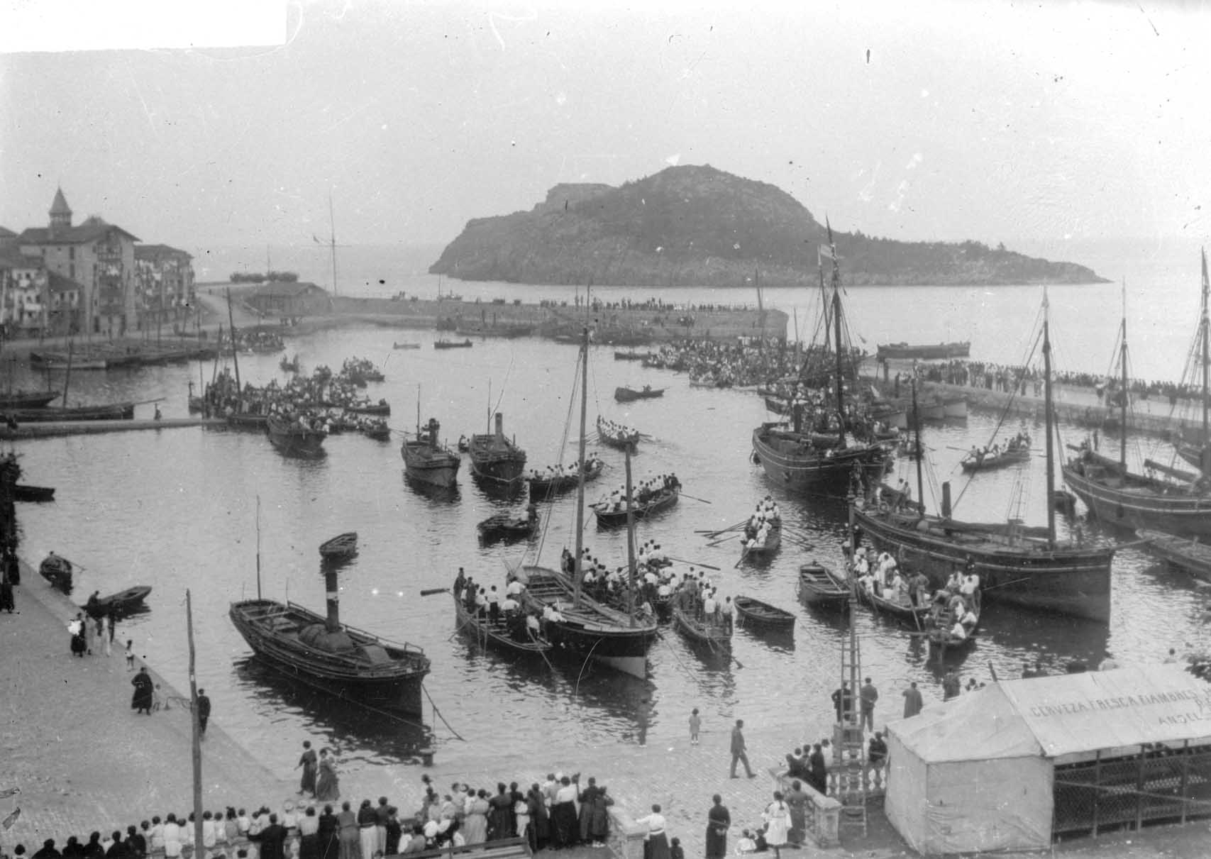 1919ko Antzar eguna.